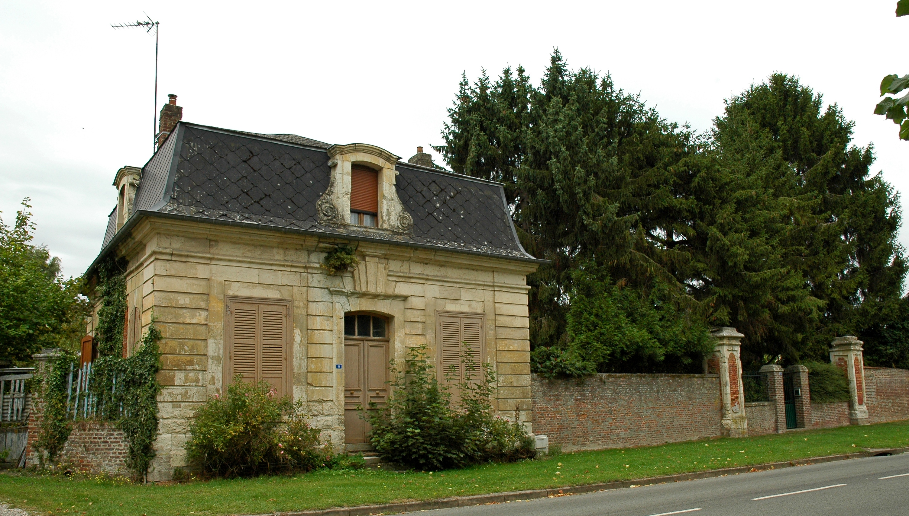 Heilly (Somme, France). Le château.